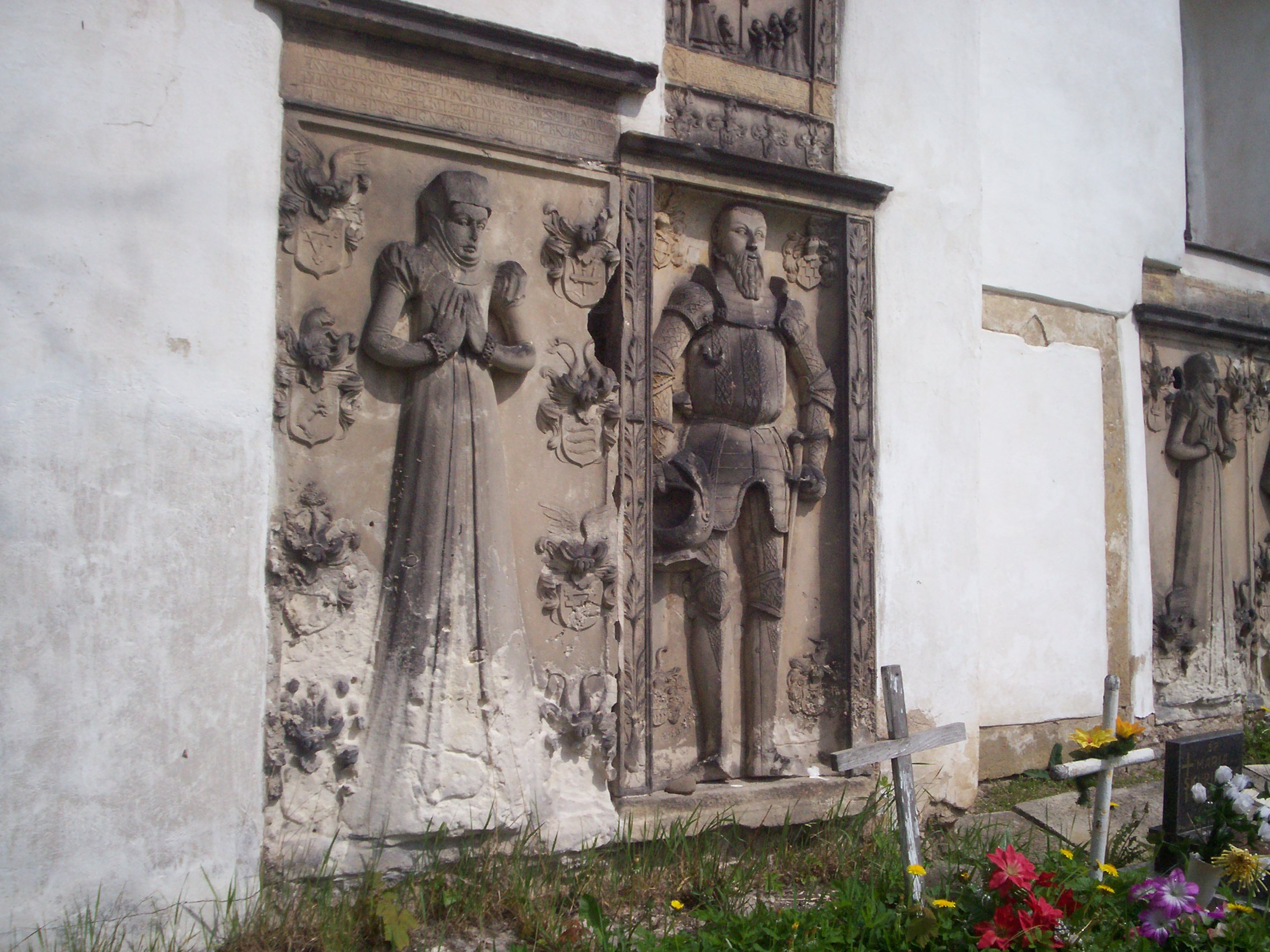 Kościół pw. „Świętej Katarzyny.” w Marciszowie. Epitafia.